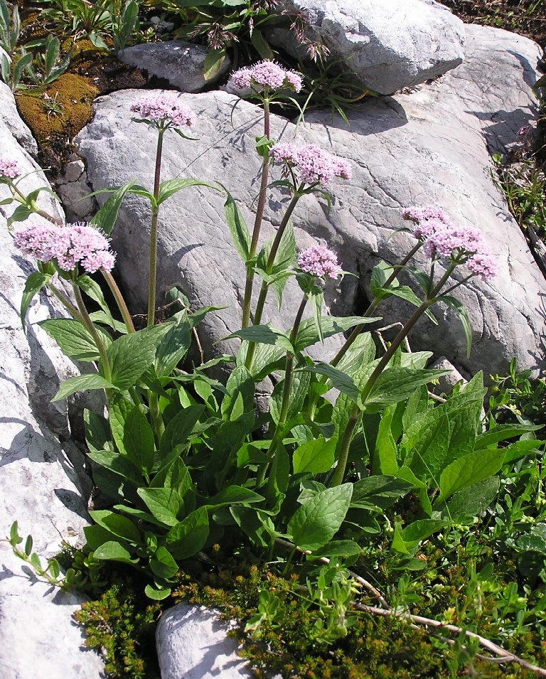 Valeriana montana auf dem Krippenstein, ca. 1900m hoch (auf Kalkstein, Dachsteinmassif, Österreich).